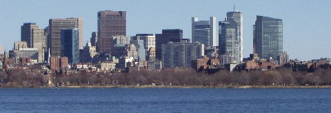 photographie de Boston